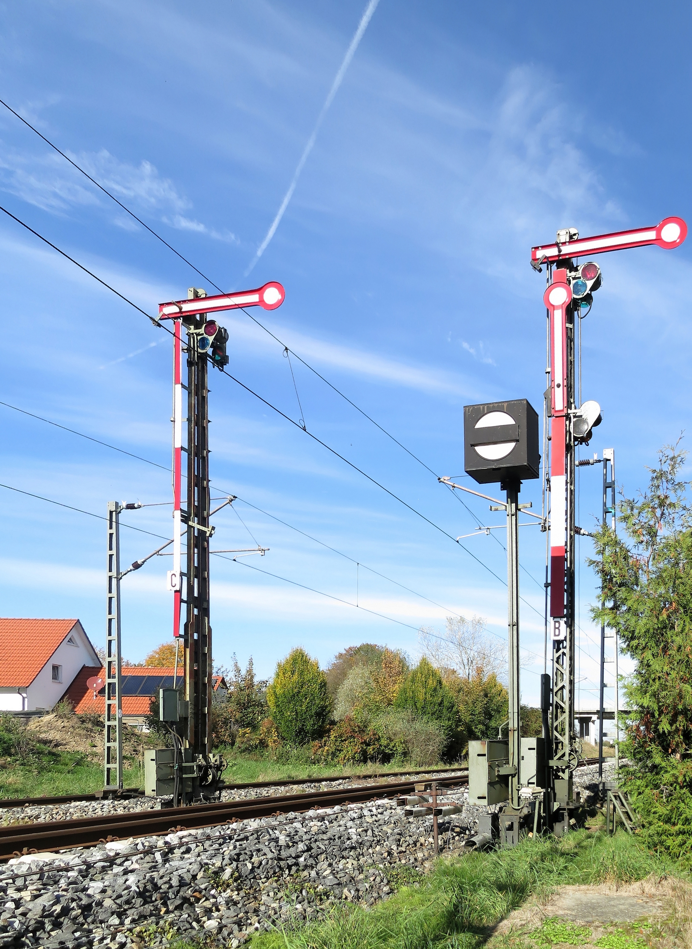 Ausfahrformsignale des Bahnhofs Egling an der Ammerseebahn